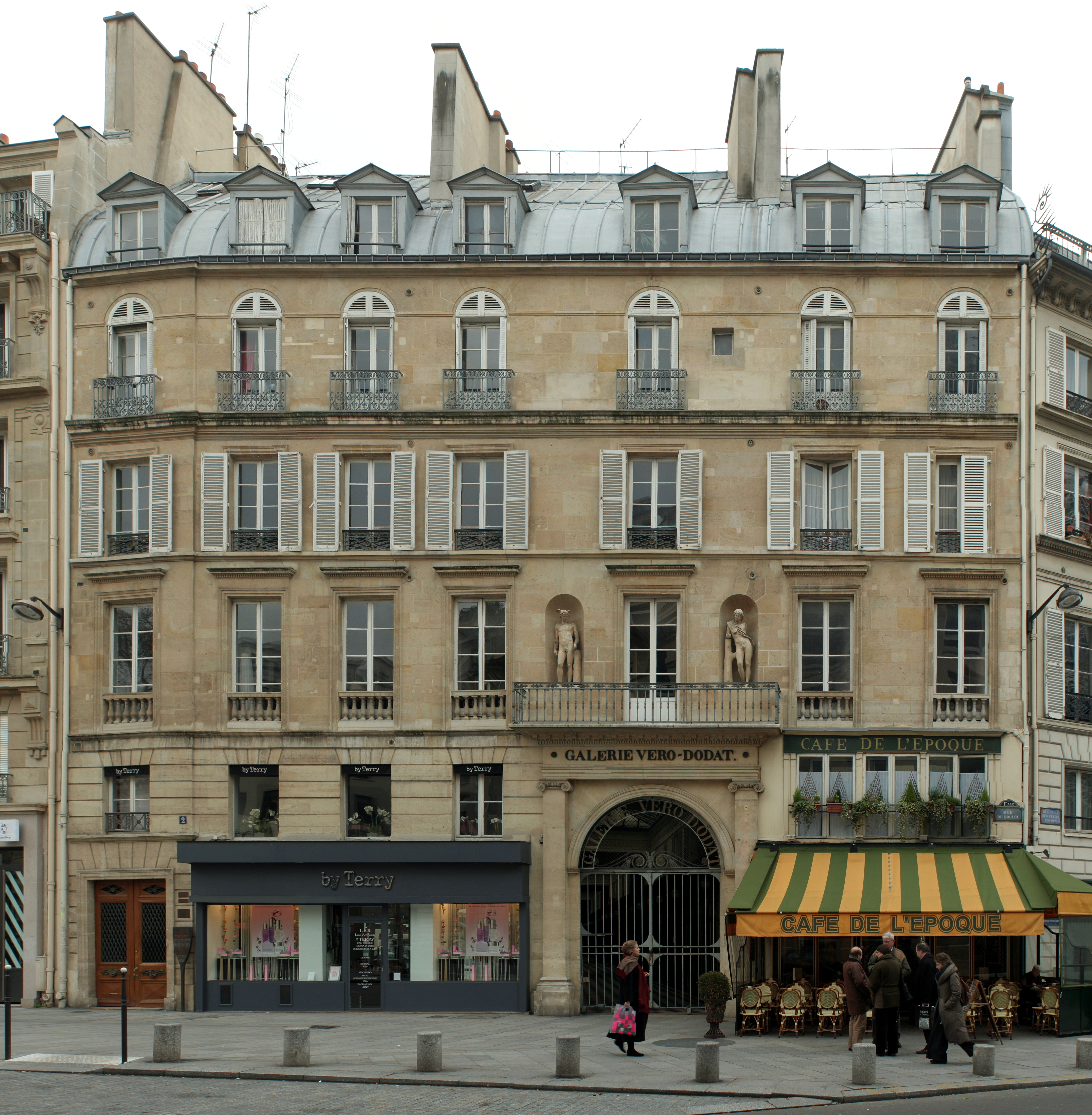 Façade de l'immeuble 2 rue du Bouloi, Paris 1er, avec l'entrée de la galerie galerie Véro-Dodat. This image was created with Hugin.